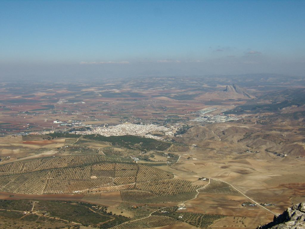 Vega de Antequera, España.